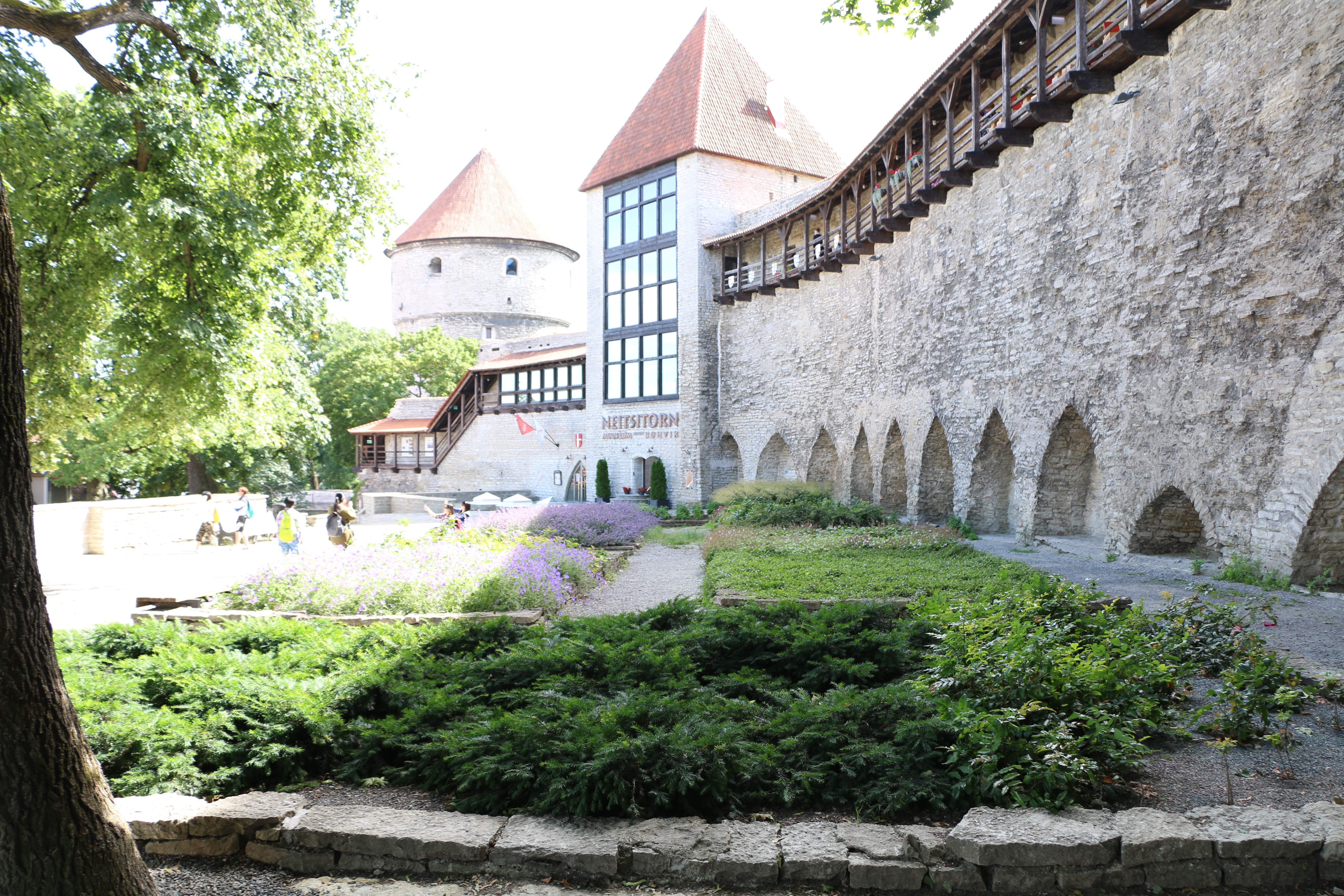 Taani kuninga aiad Neitsitorni poole